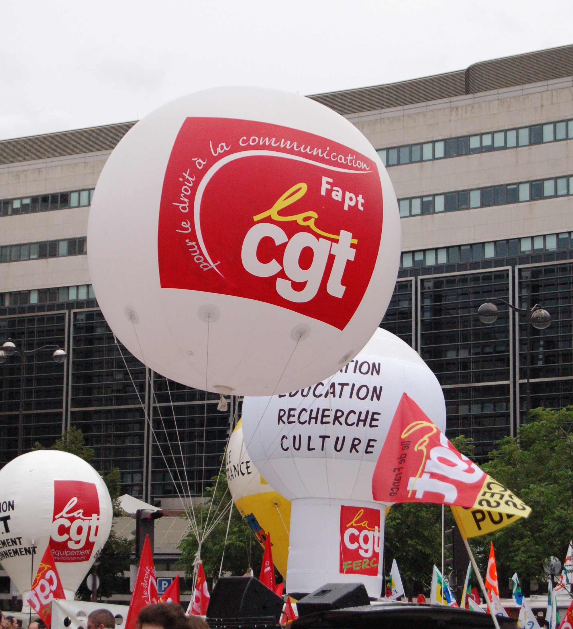 Ballon de la Confédération générale du travail lors de la manifestation des fonctionnaires du 31 mai 2011 devant le Ministère du Budget, des Comptes publics, de la Fonction publique et de la Réforme de l'État à Paris, France.